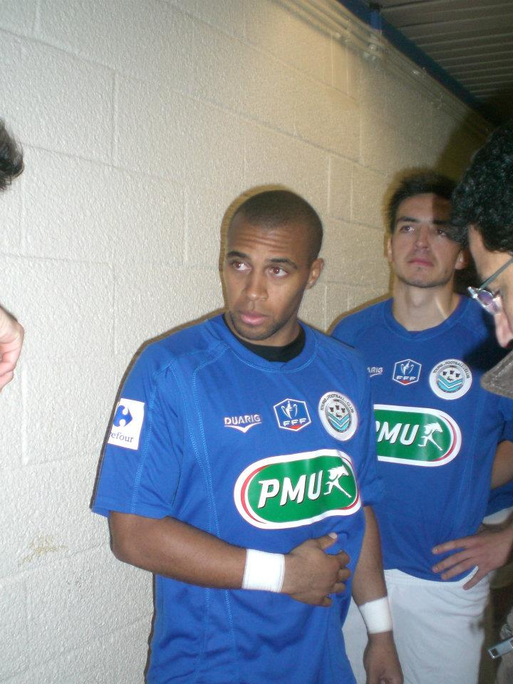 Thomas Gamiette avant le début du match Avion / Tours - septième tour de la Coupe de France de Football à Avion le 19 novembre 2011